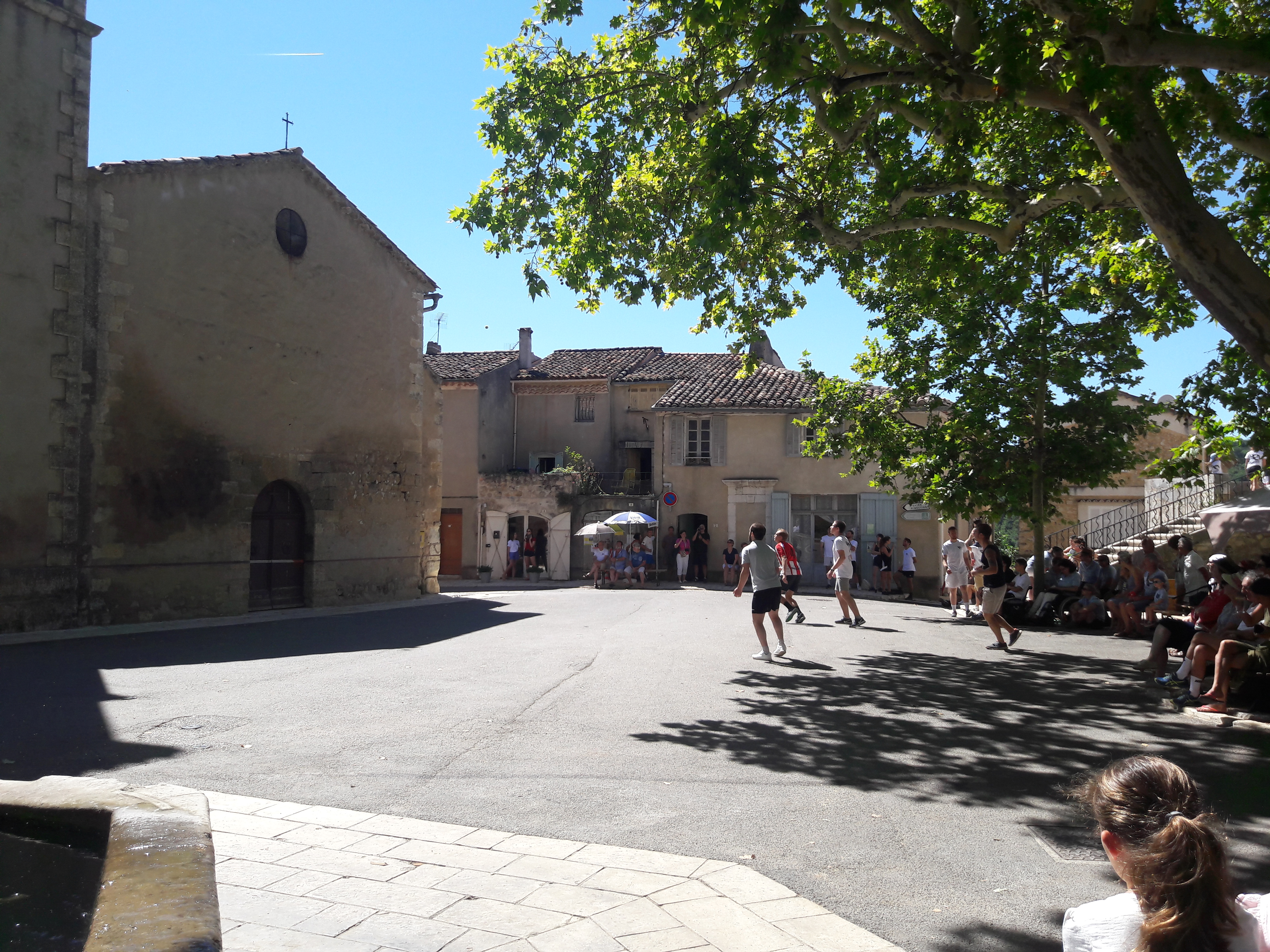 Match de paume artignoscaise pendant les épreuves de la Coupe du monde artignoscaise organisé par l'AIPA (Association internationale de paume artignoscaise)